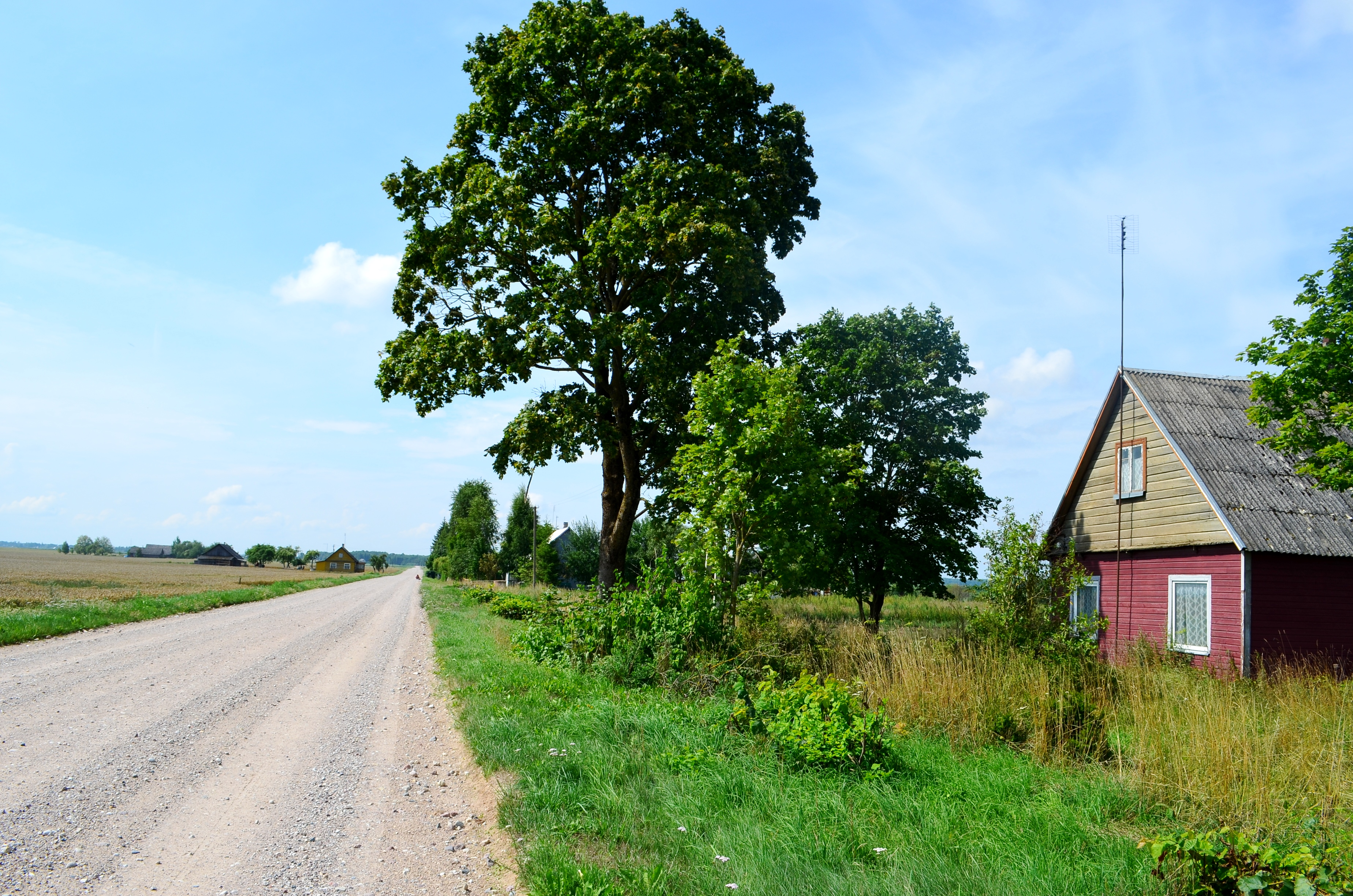 Šukioniai, Truskavos sen., Kėdainių raj.